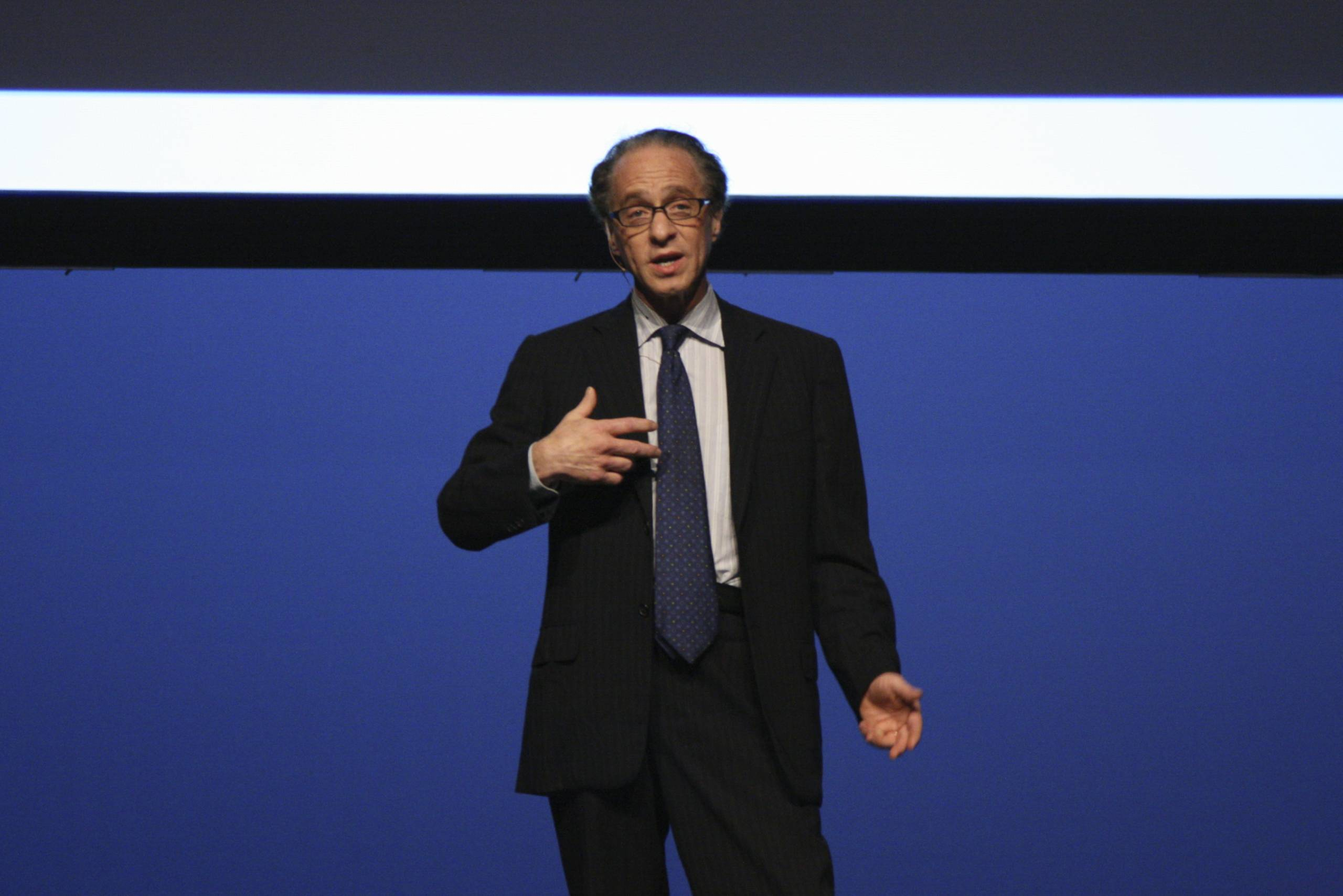 Ray Kurzweil at UP Experience 2008.